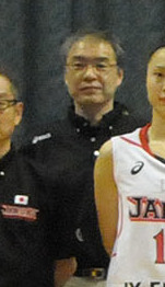 バスケットボール女子日本代表チーム（FIBA世界選手権出場）。秋田市立体育館で。